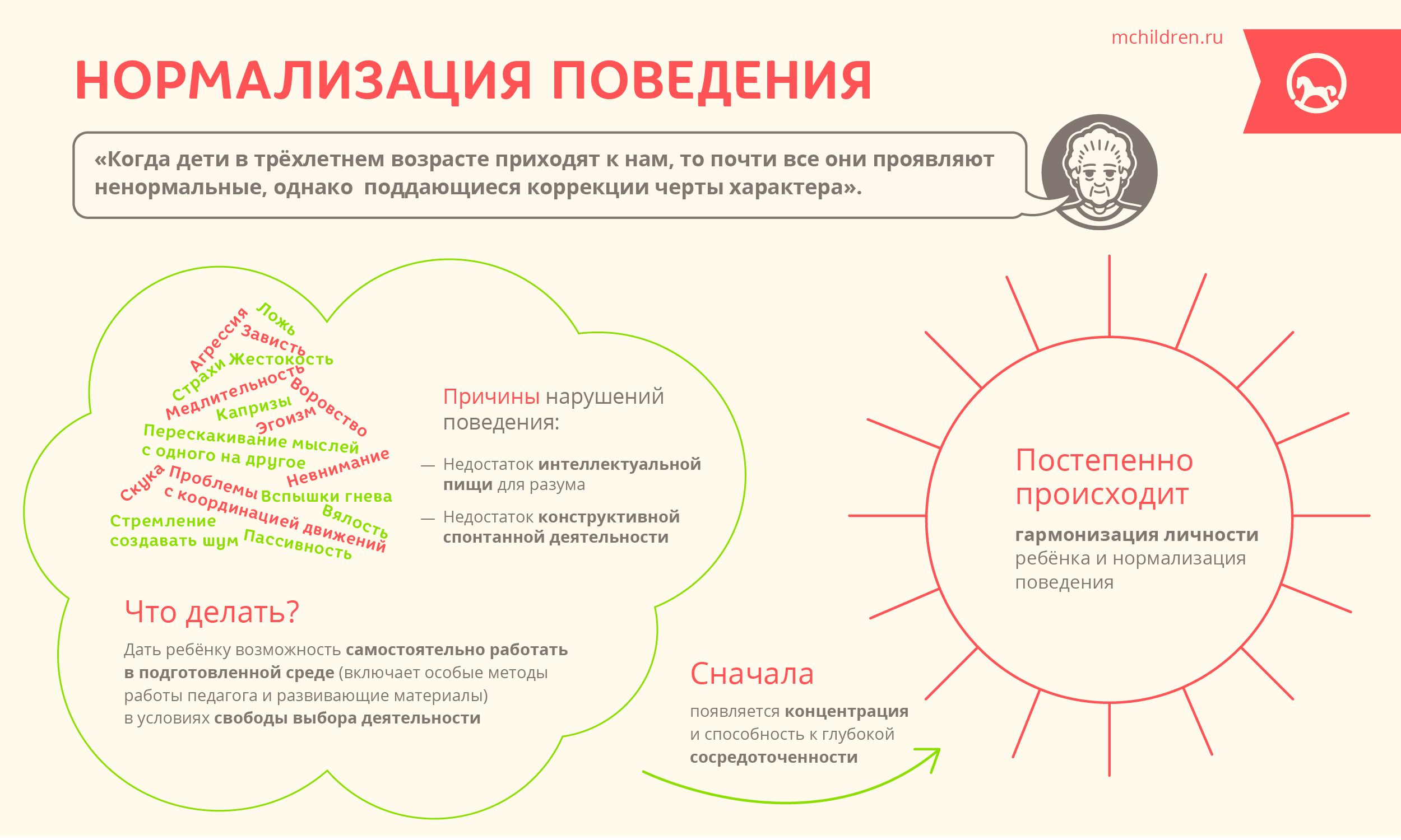 Нормализация поведения ребенка